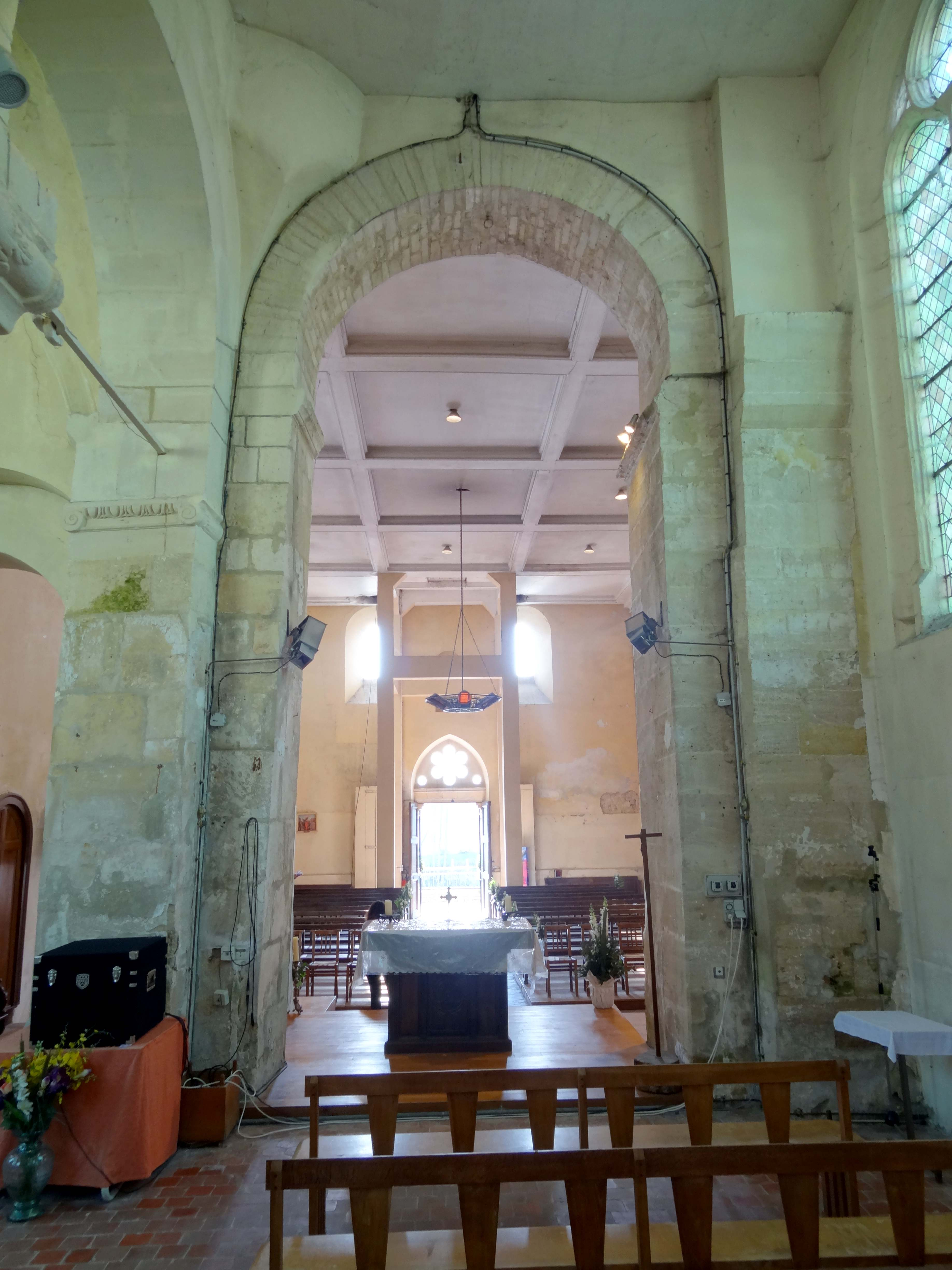 Intérieur de l'église - voir titre.